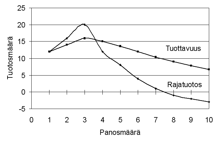 Rajatuotos ja keskimääräinen tuottavuus